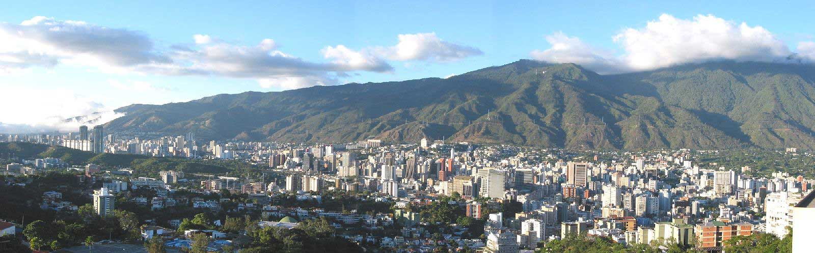 Panorámica de Caracas